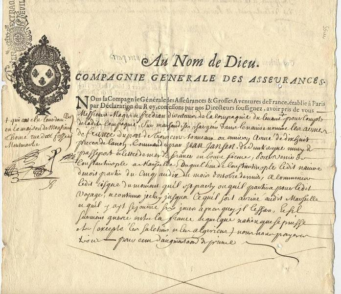 Contrat d'assurance entre la Compagnie Générale des Asseûrances et Grosses Aventures de France et la Compagnie du Levant signé le 5 novembre 1687.